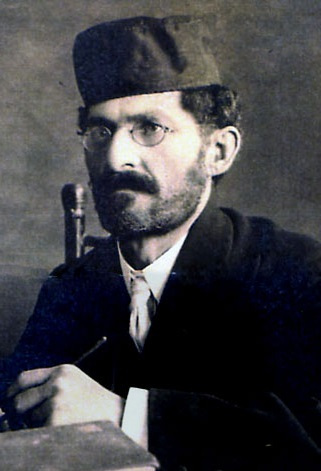 .הרב בן-ציון אייזנשטט